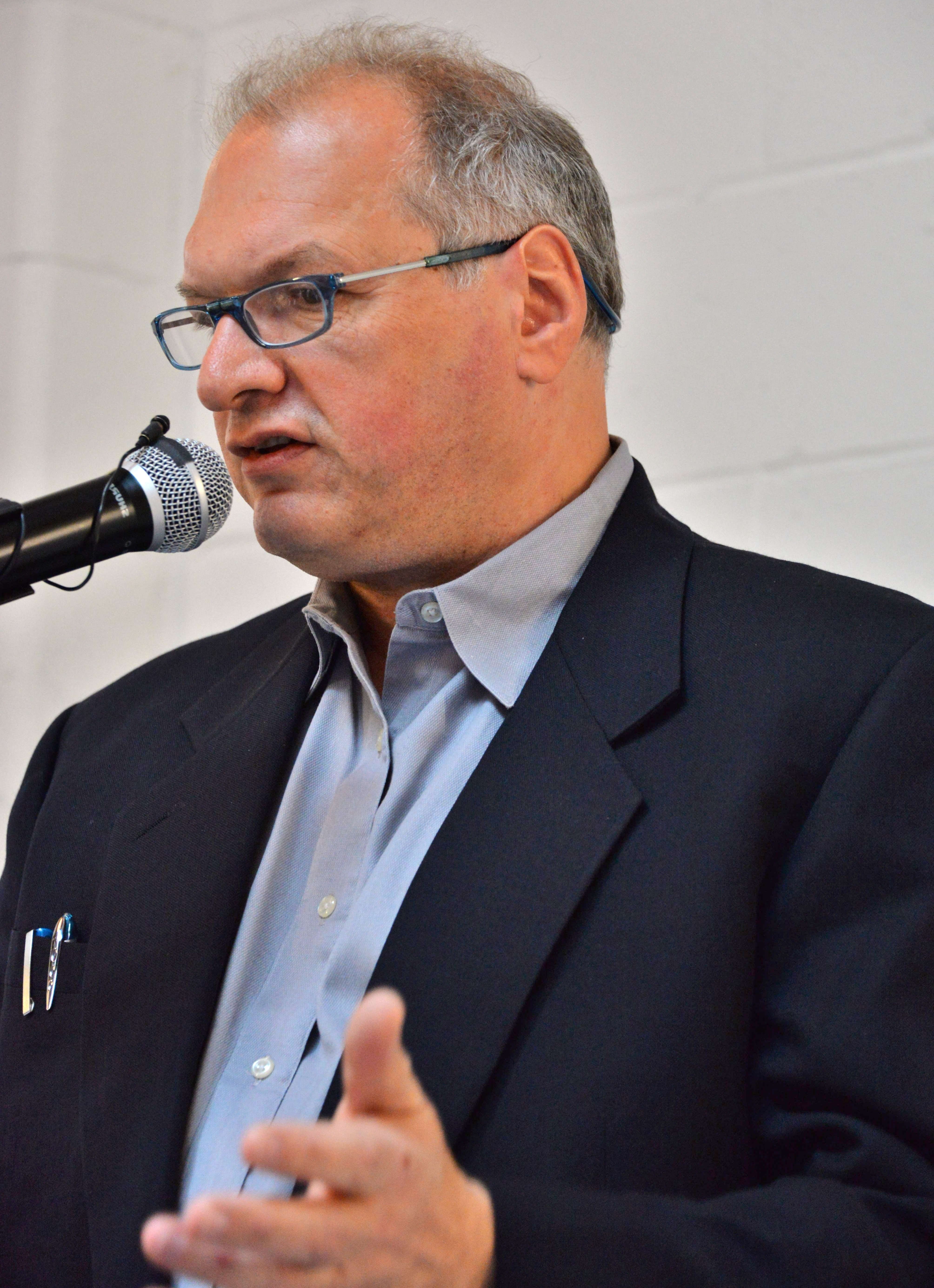 Юрій Фельштинський виступає в Торонто на презентації про участь російських збройних сил у боях в Україні